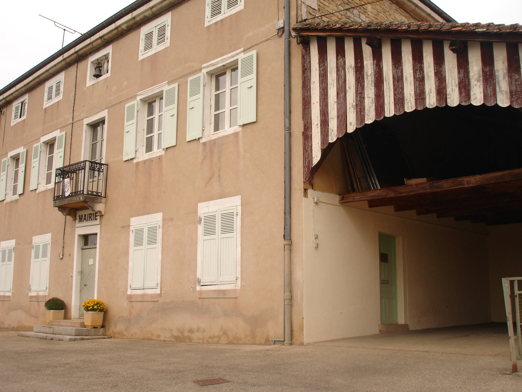 Vue générale de l'église et de la cure de Courmangoux (Ain)